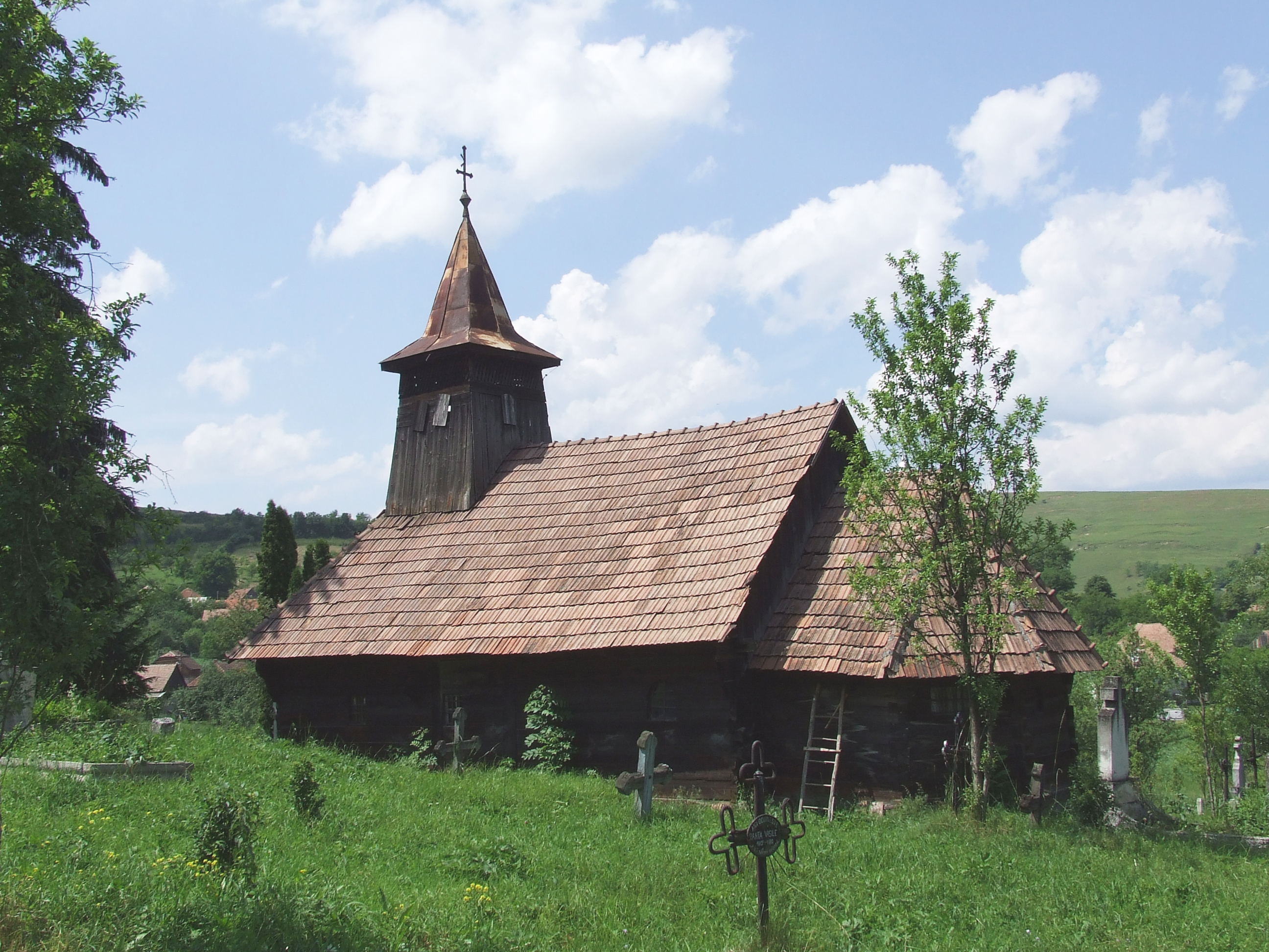 Biserica de lemn din Gârbău